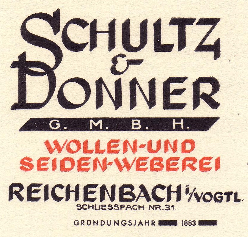 Logo Schultz & Donner